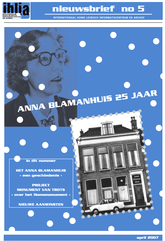 IHLIA Nieuwsbrief (april 2007)over Anna Blamanhuis (voorheen Noordvliet 11, Leeuwarden)